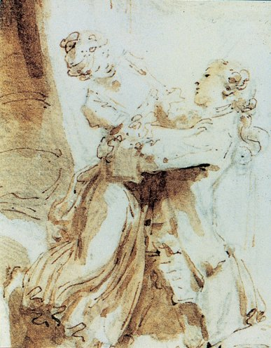 Gravure de Fragonard